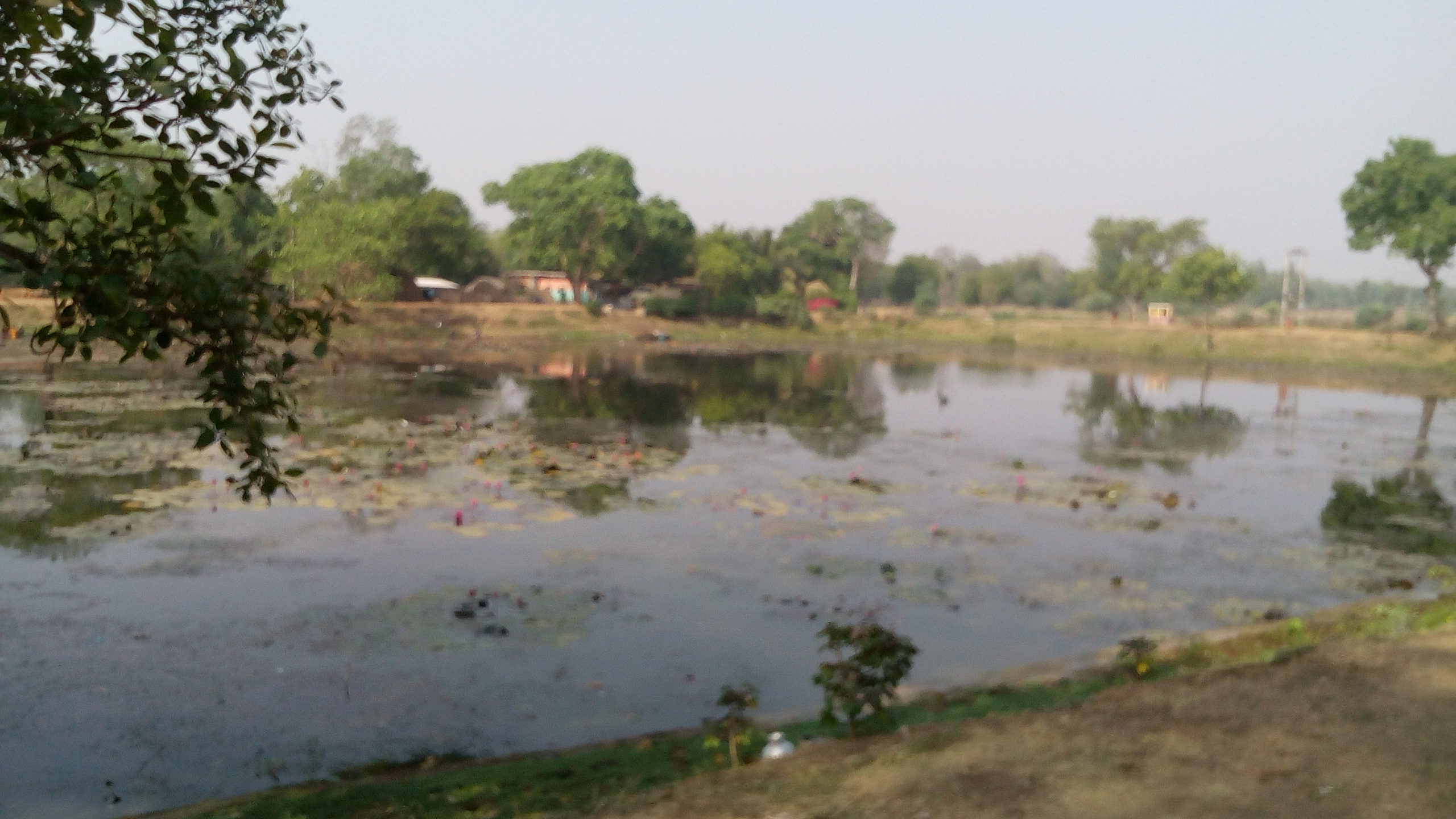 Badagadia khalana